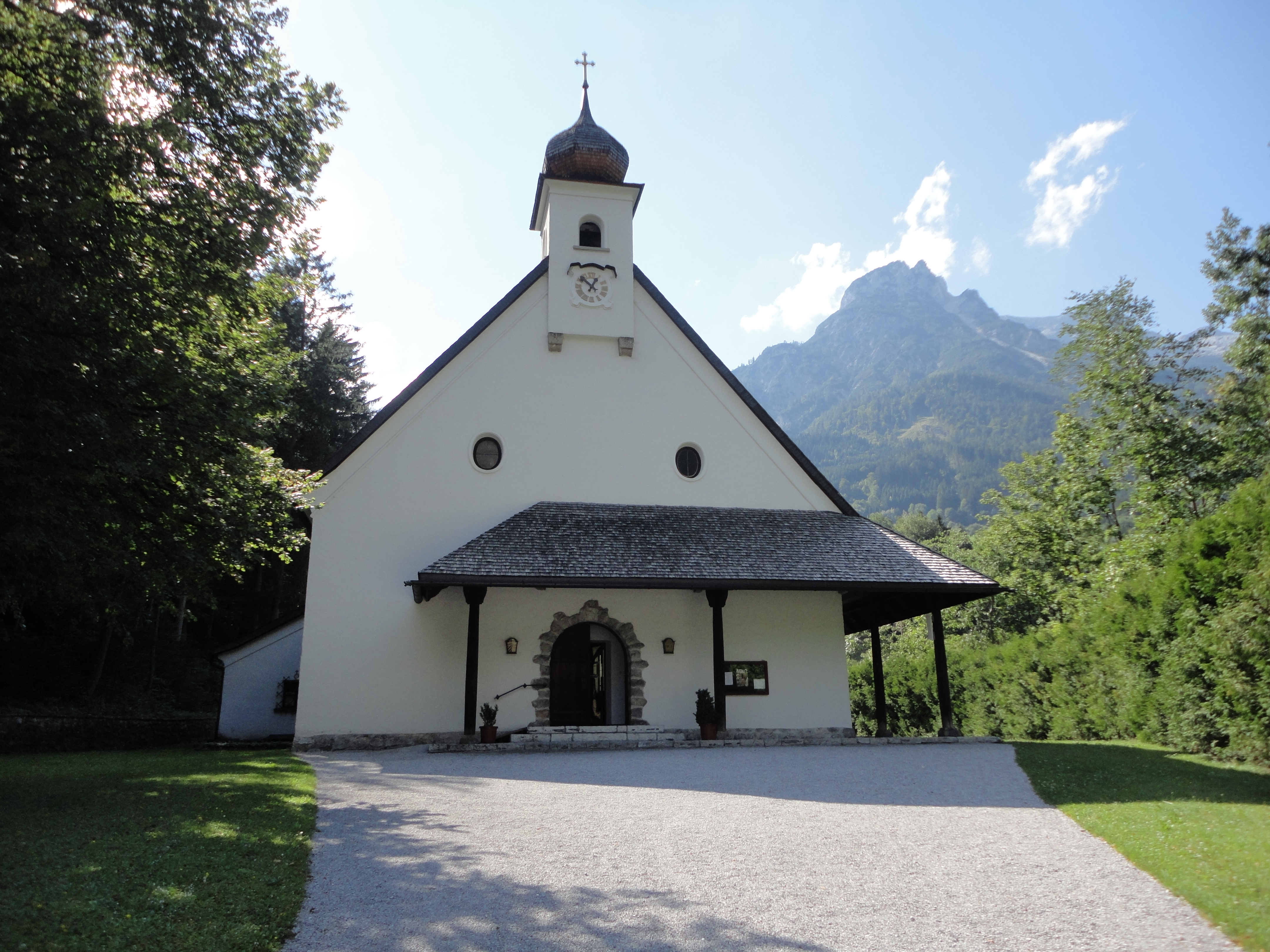 Kath. Filialkirche hl. Barbara in Tenneck. Im Hintergrund der Rifflkopf (2254m) im Hagengebirge.